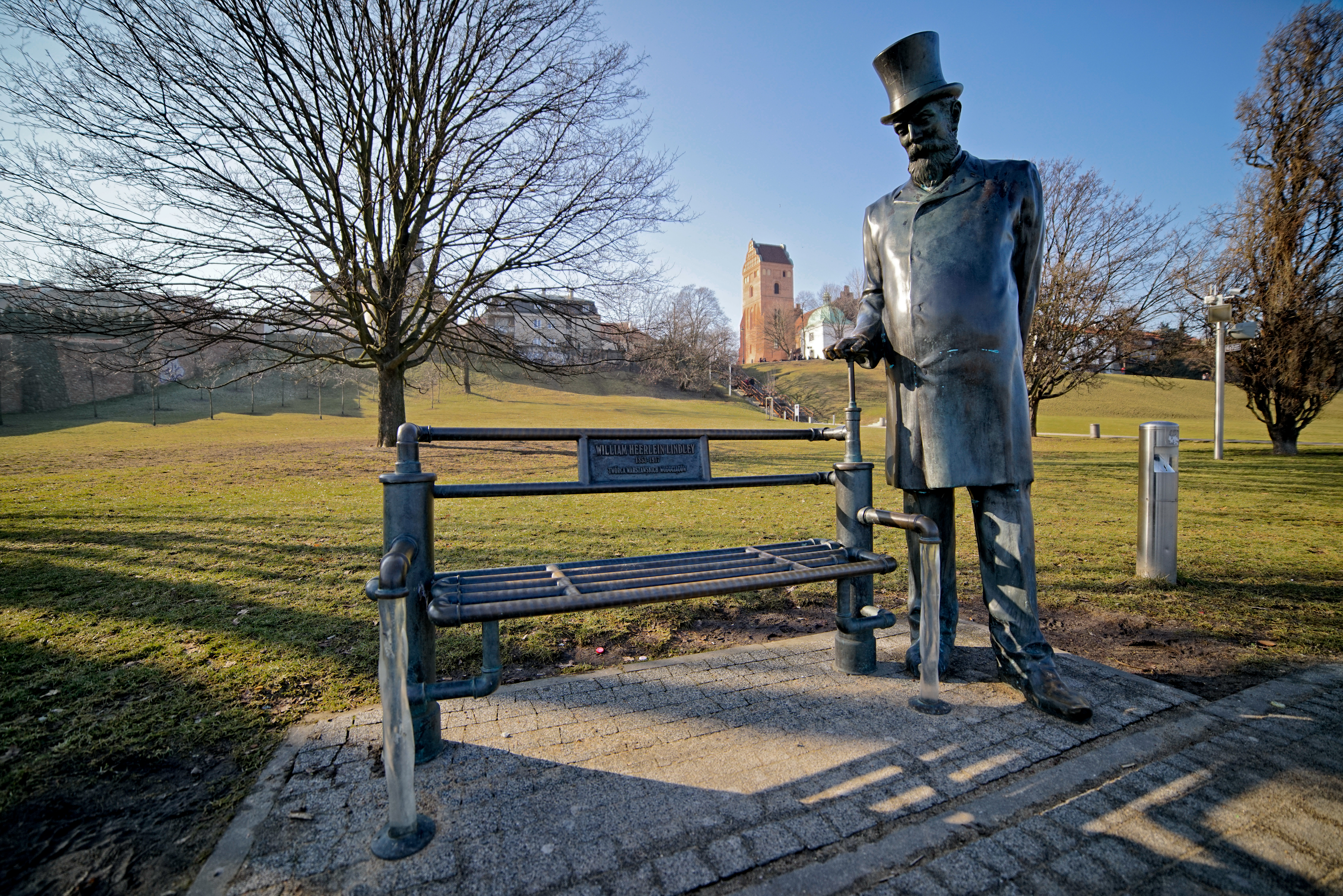 Pomnik-ławka Williama Heerleina Lindley'a w Warszawie